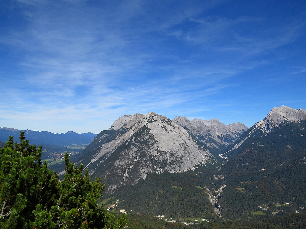 Die Brunnensteinspitze bildet einen Doppelgipfel mit der Rotwandlspitze am südwestlichen Ende der Nördlichen Karwendelkette